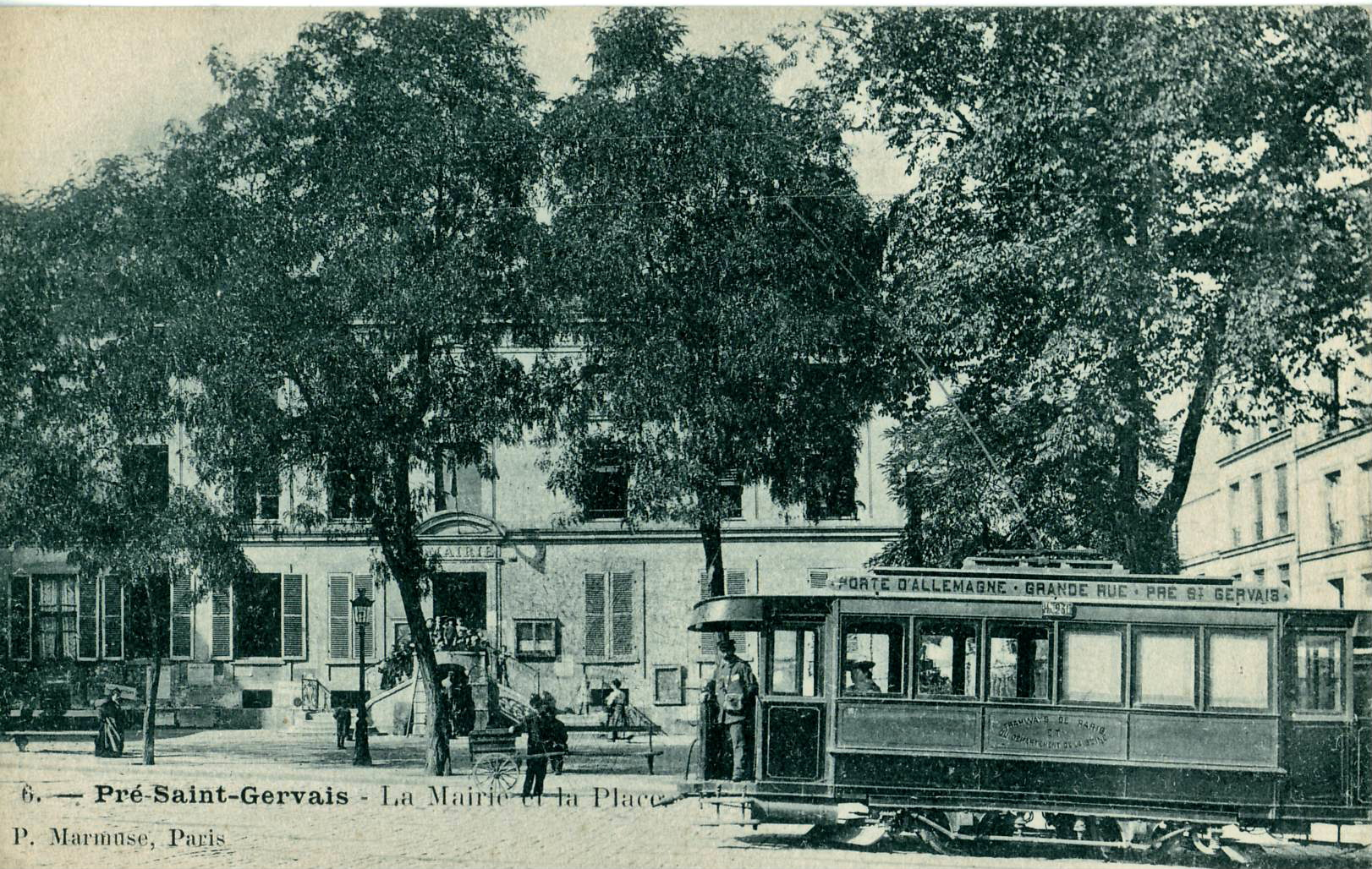 Carte postale ancienne éditée par Marmuse Le Pré-Saint-Gervais : La Mairie et la PlaceVue en gros plan d'un tramway des TPDS